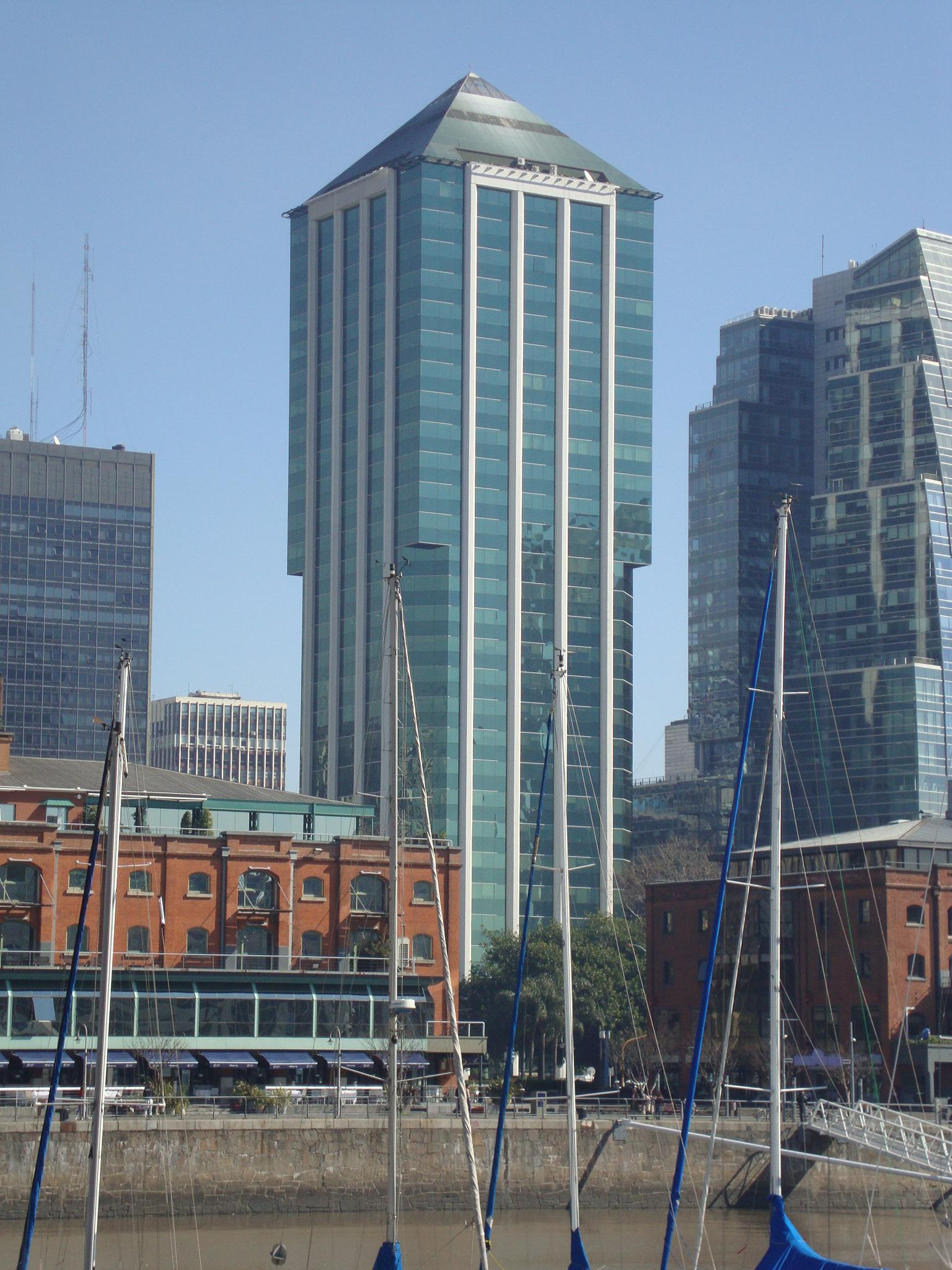 Vista de la Torre Bouchard, desde el malecón este del Dique 4 de Puerto Madero. Buenos Aires, Argentina.